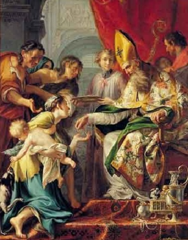 "Elemosina di Sant'Eligio", olio su tela, 220 x 153 cm., firmato, Parma, chiesa di San Pietro